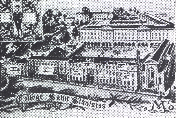 Gravure représentant le collège Saint-Stanislas de Mons (Belgique). 1907. Auteur et source inconnue.